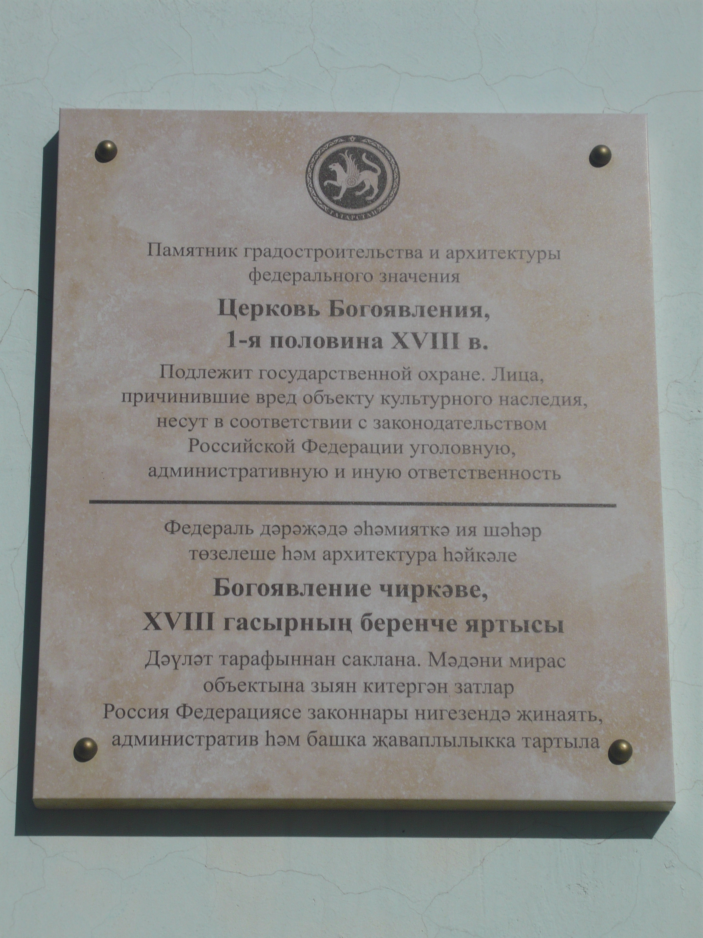 Табличка церкви Богоявления